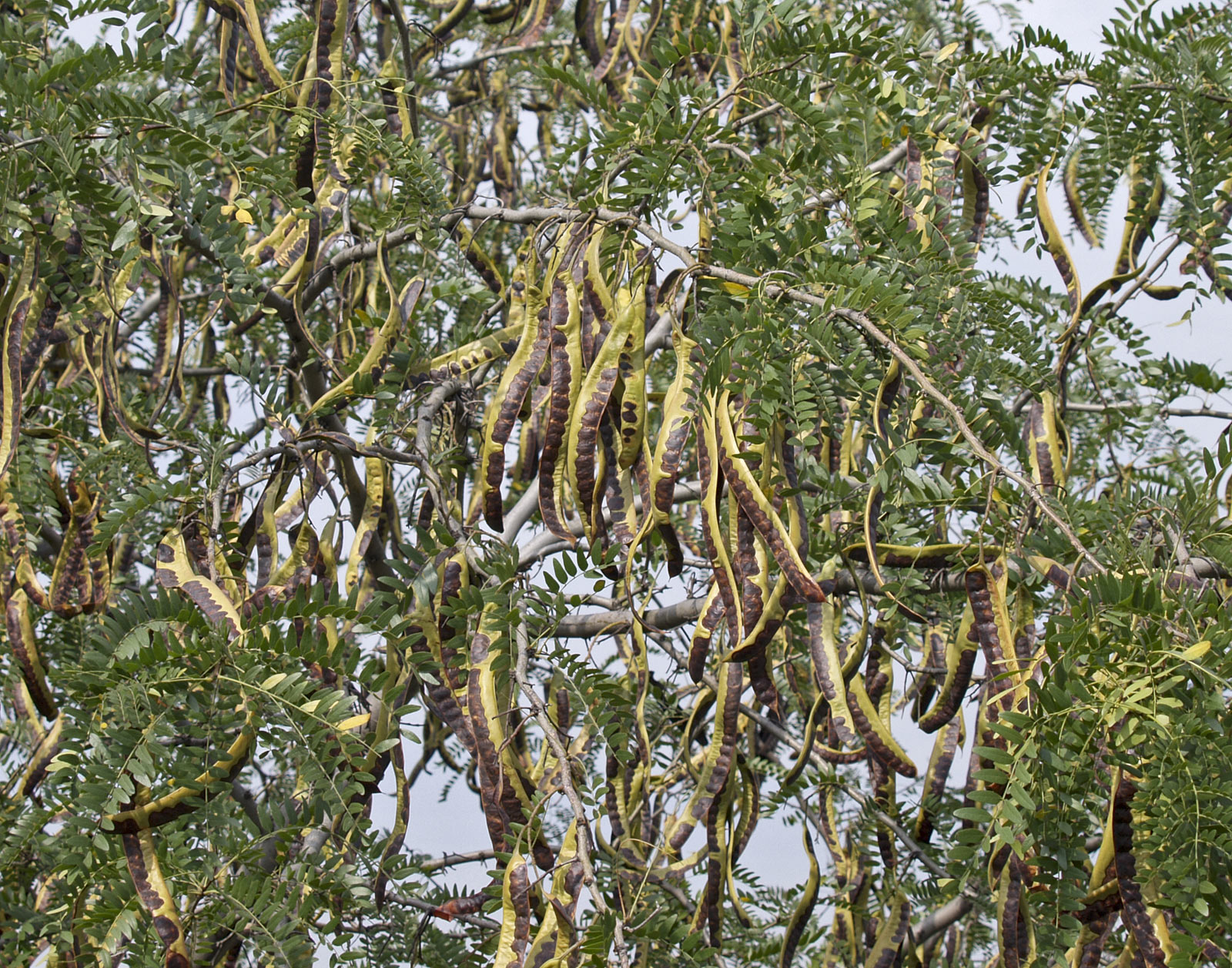 Gleditsia triacanthos, frutos empezando a oscurecerse. Parque del Oeste, Madrid.